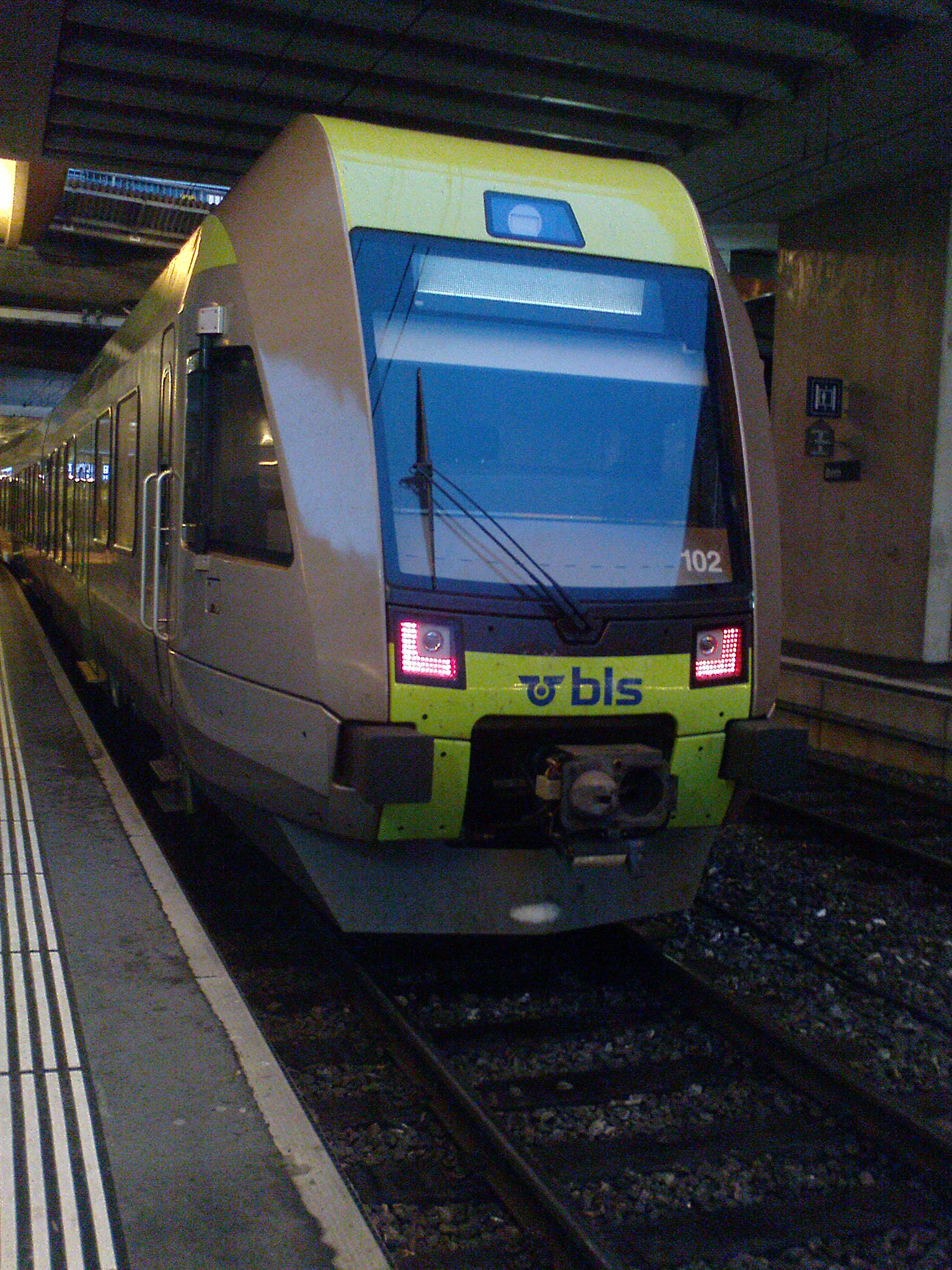 BLS RABe 535 102 im HB Bern